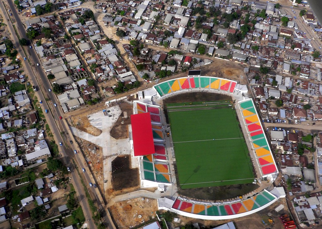 football